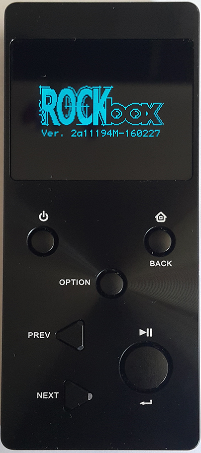 X3 rockbox